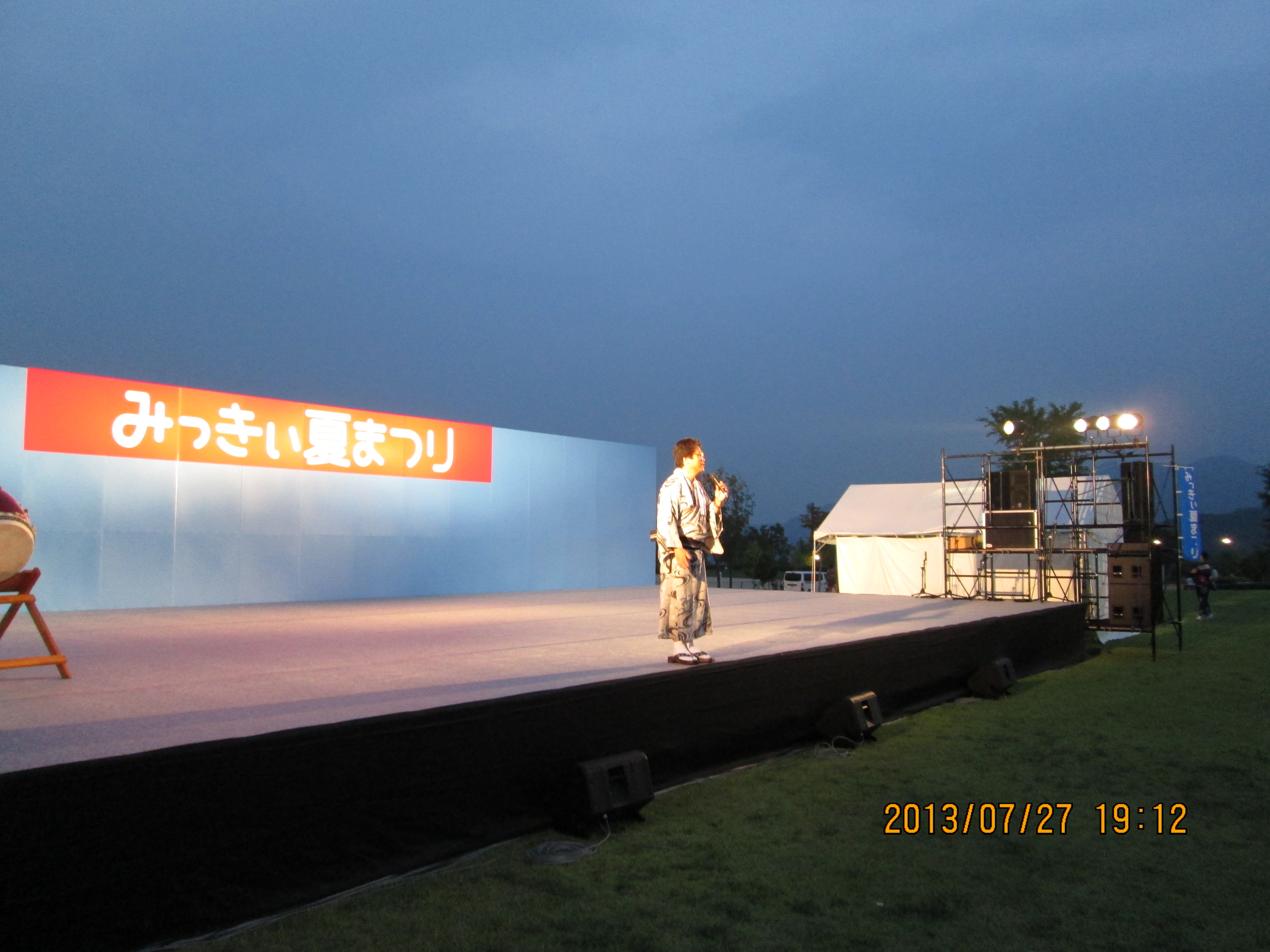 みっきぃ夏まつり花火大会（2013年）